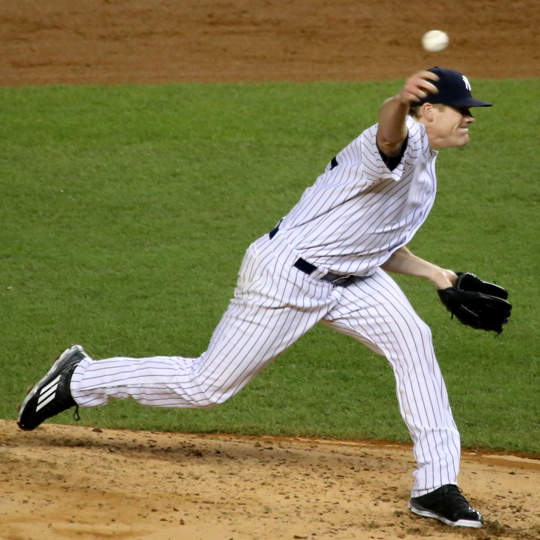 Branden Pinder